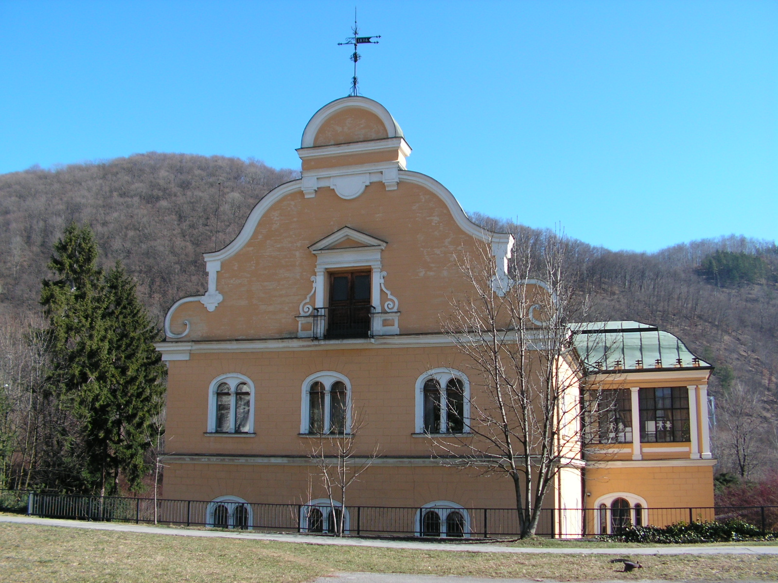 Kaštiel